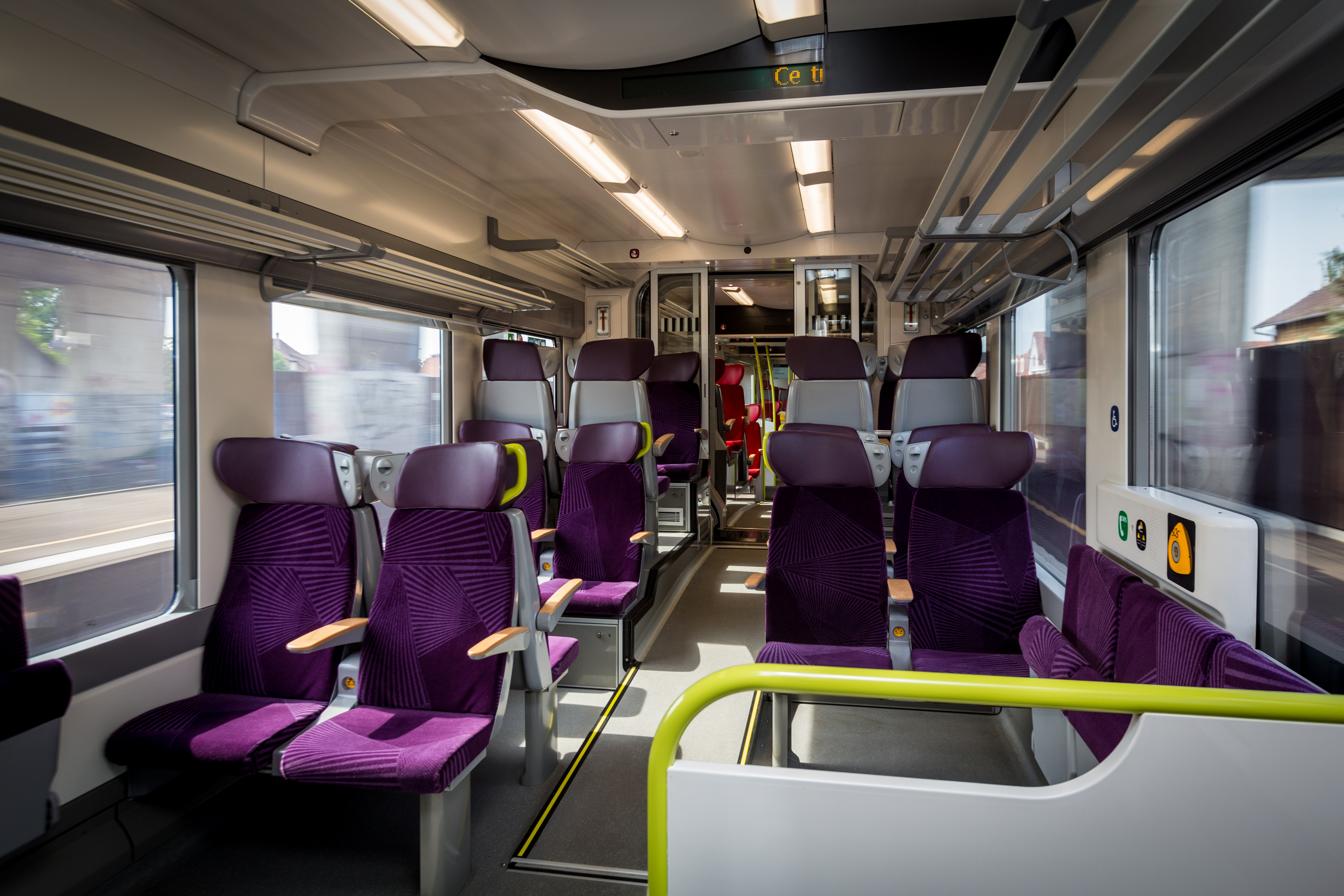 Régiolis 83511 TER Alsace 28 mai 2015